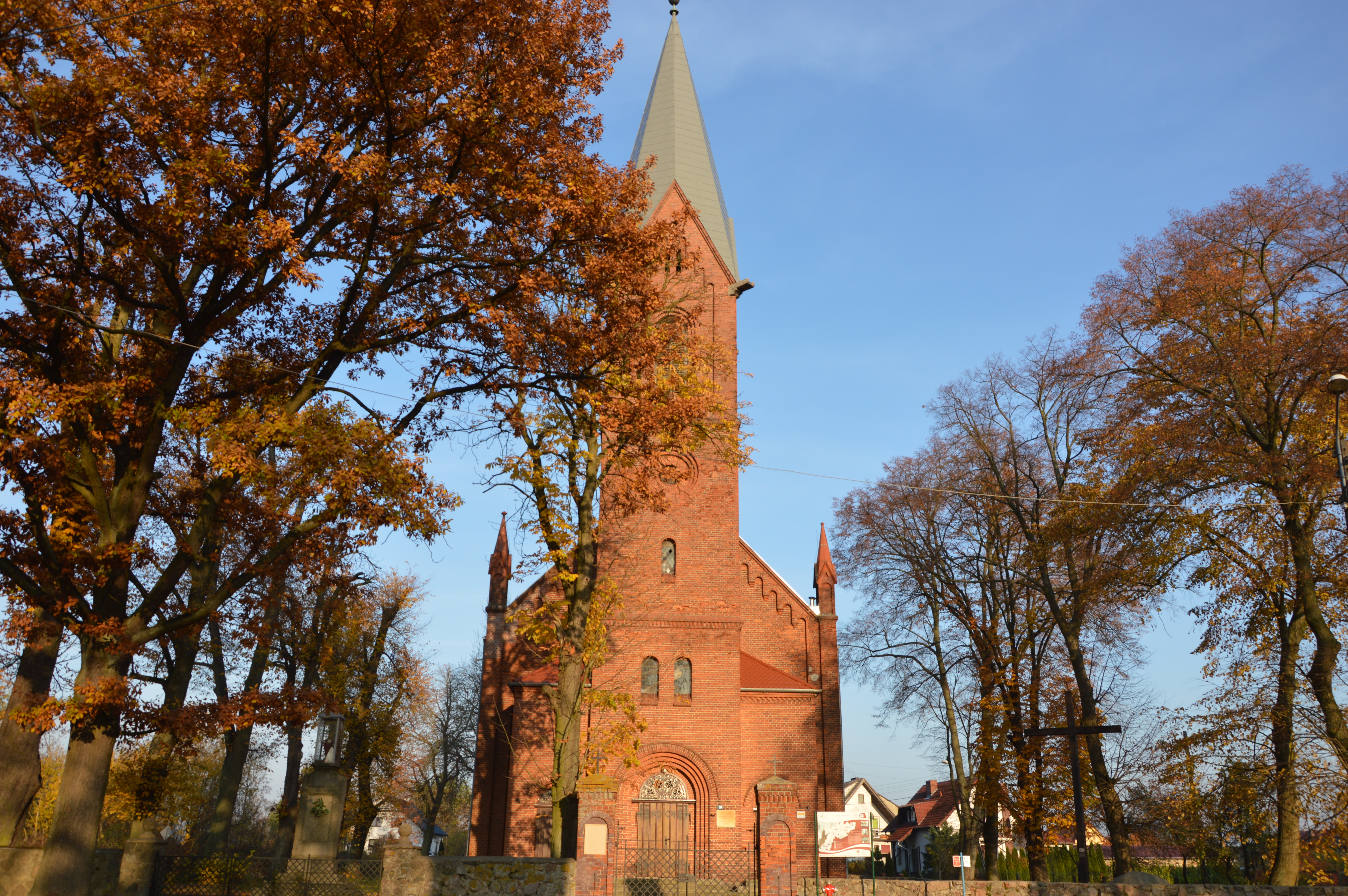 PŁONNO